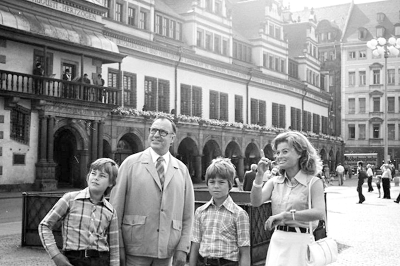 Leipzig, Besuch Helmut Kohl mit Familie ADN-ZB/Raphael/19.8.75 Leipzig: Dr. Helmut Kohl, Vorsitzender der CDU in der der BRD, mit seiner Familie während eines Stadtbummels in der Messestadt. [Leipzig.- Helmut Kohl mit Ehefrau Hannelore Kohl und den Söhnen Walter Kohl und Peter Kohl bei Stadtbummel] Abgebildete Personen: Kohl, Helmut: Bundeskanzler, Ministerpräsident von Rheinland-Pfalz, CDU, Bundesrepublik Deutschland (GND 118564595) Kohl, Hannelore: Ehefrau des Bundeskanzlers Helmut Kohl, Vorsitzende der Stiftung für Verletzte mit Schäden des zentralen Nervensystems ZNS, Bundesrepublik Deutschland (GND 123628474)